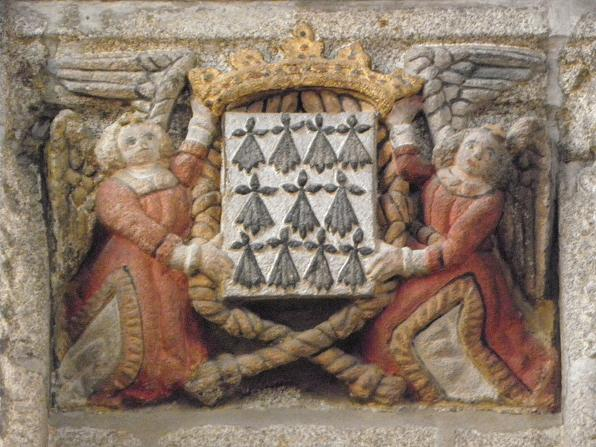 Écusson de Bretagne en bannière, entouré d'une cordelière et soutenu par deux anges. Détail du retable de la grande-chapelle Notre-Dame de l'église Saint-Sulpice de Fougères (35).